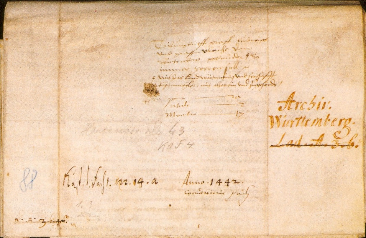 Vertrag Landesteilung 1442 mit den Siegeln Graf Ludwig I. und Ulrich V. von Württemberg und ihrer Mutter Henriette von Mömpelgard (Siegel aus Copyrightgründen nicht abgebildet. Siehe: Nicht schützbare Fotos (Reproduktionen)) eingescannt aus: Württemberg und Mömpelgard: 600 Jahre Begegnung. Beiträge zur wissenschaftlichen Tagung vom 17. bis 19. September 1997 im Hauptsaatsarchiv Stuttgart. Herausgegeben von Sönke Lorenz und Peter Rückert. Leinfelden-Echterdingen, 1999, S. 31